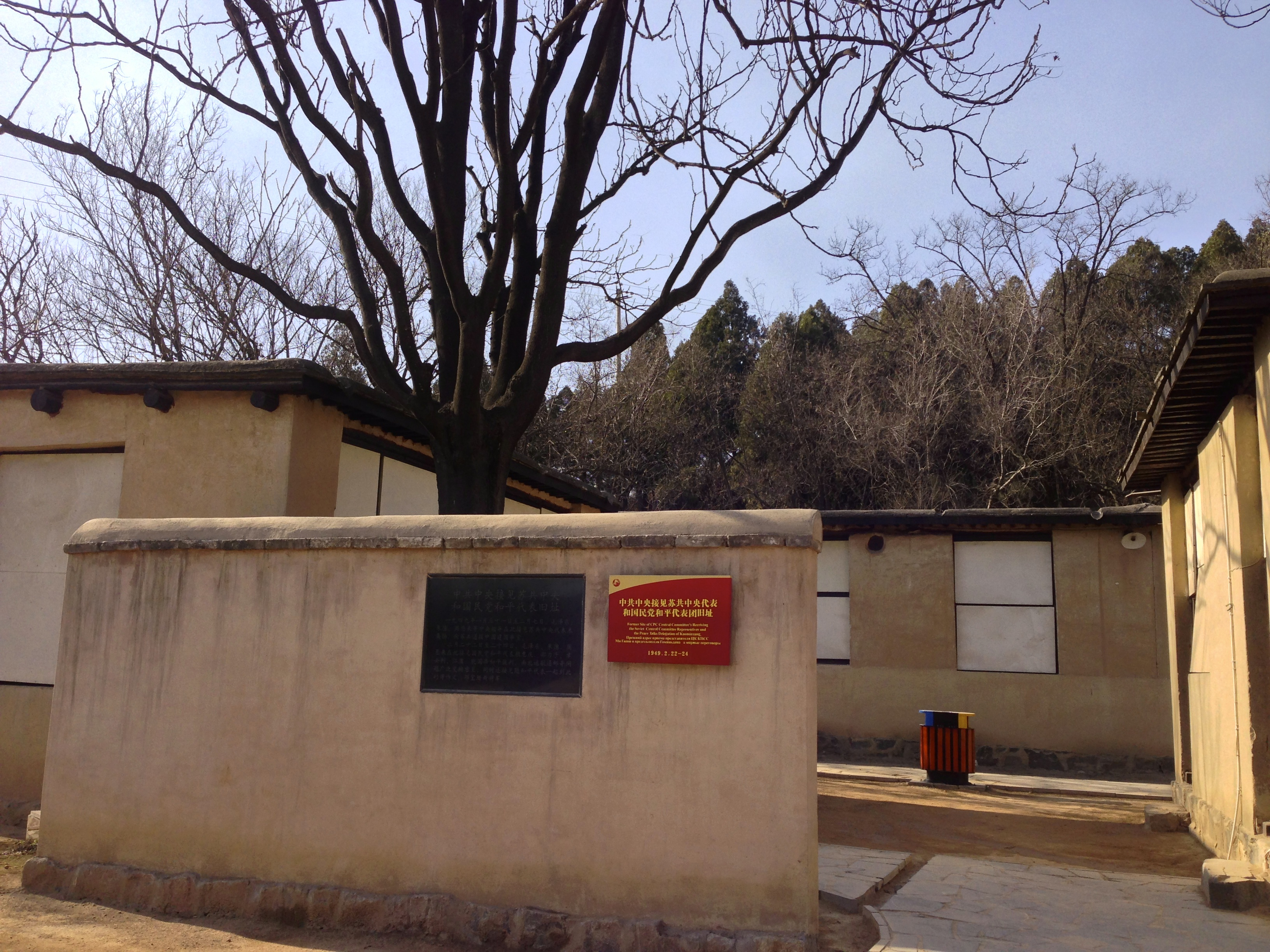 Pingshan, Shijiazhuang, Hebei, China